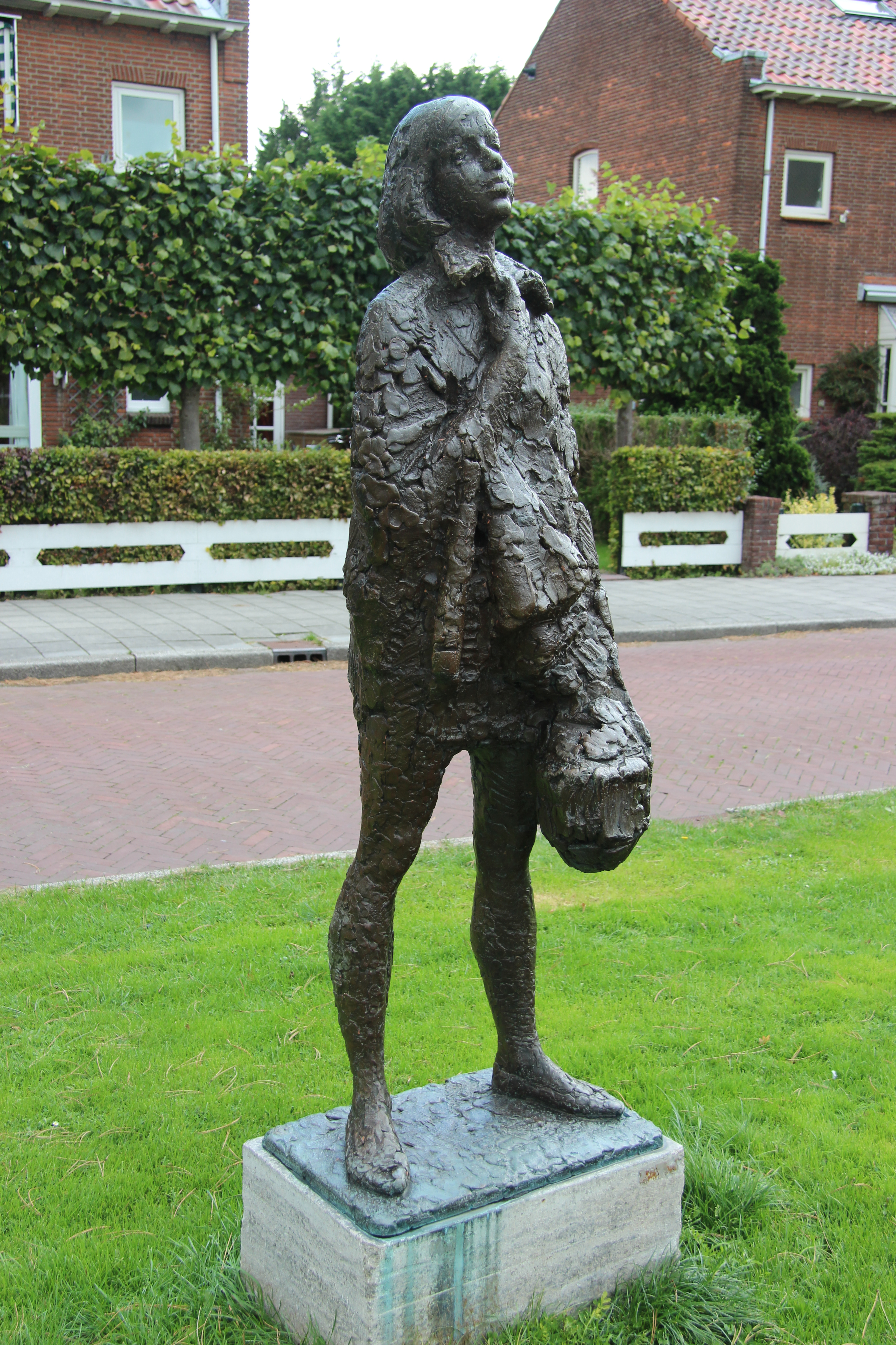 1966 - Pieter d'Hont - Schoolgaand meisje, Marelaan, Oegstgeest